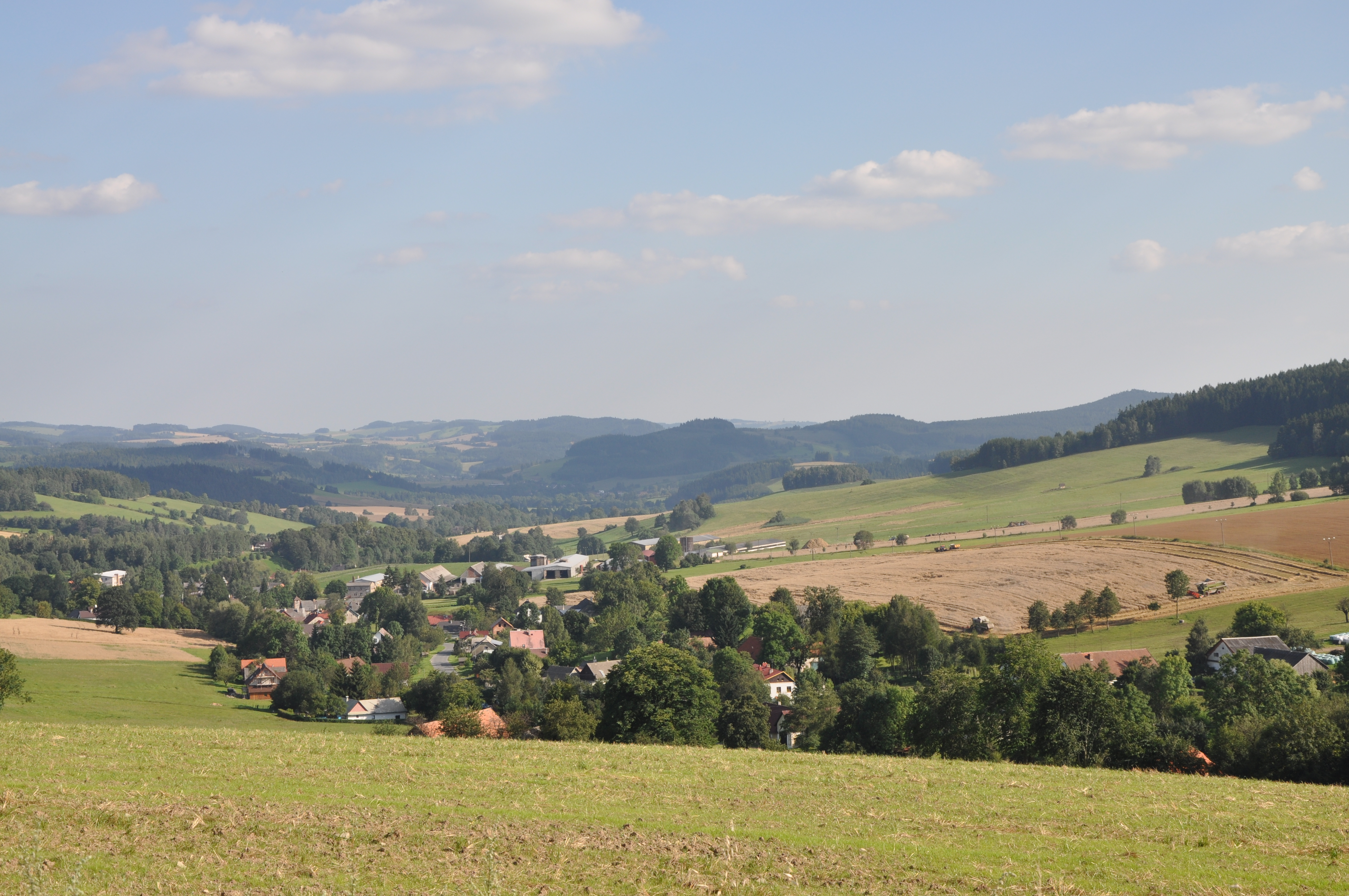 Telecí od Luckého vrchu